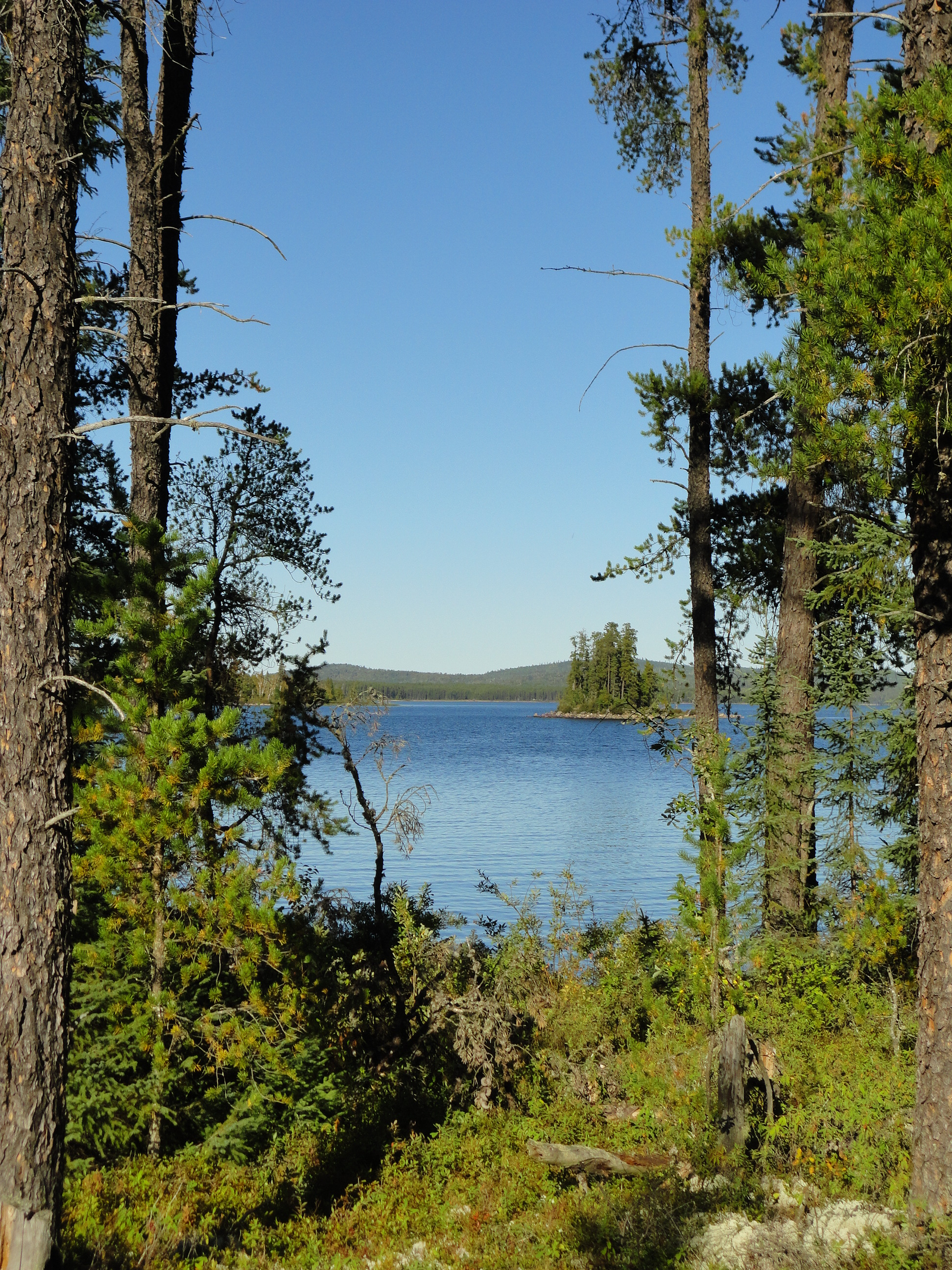 Ka mwakowok ka nokok, pecotcik Tapiskwanik/Kikentacik